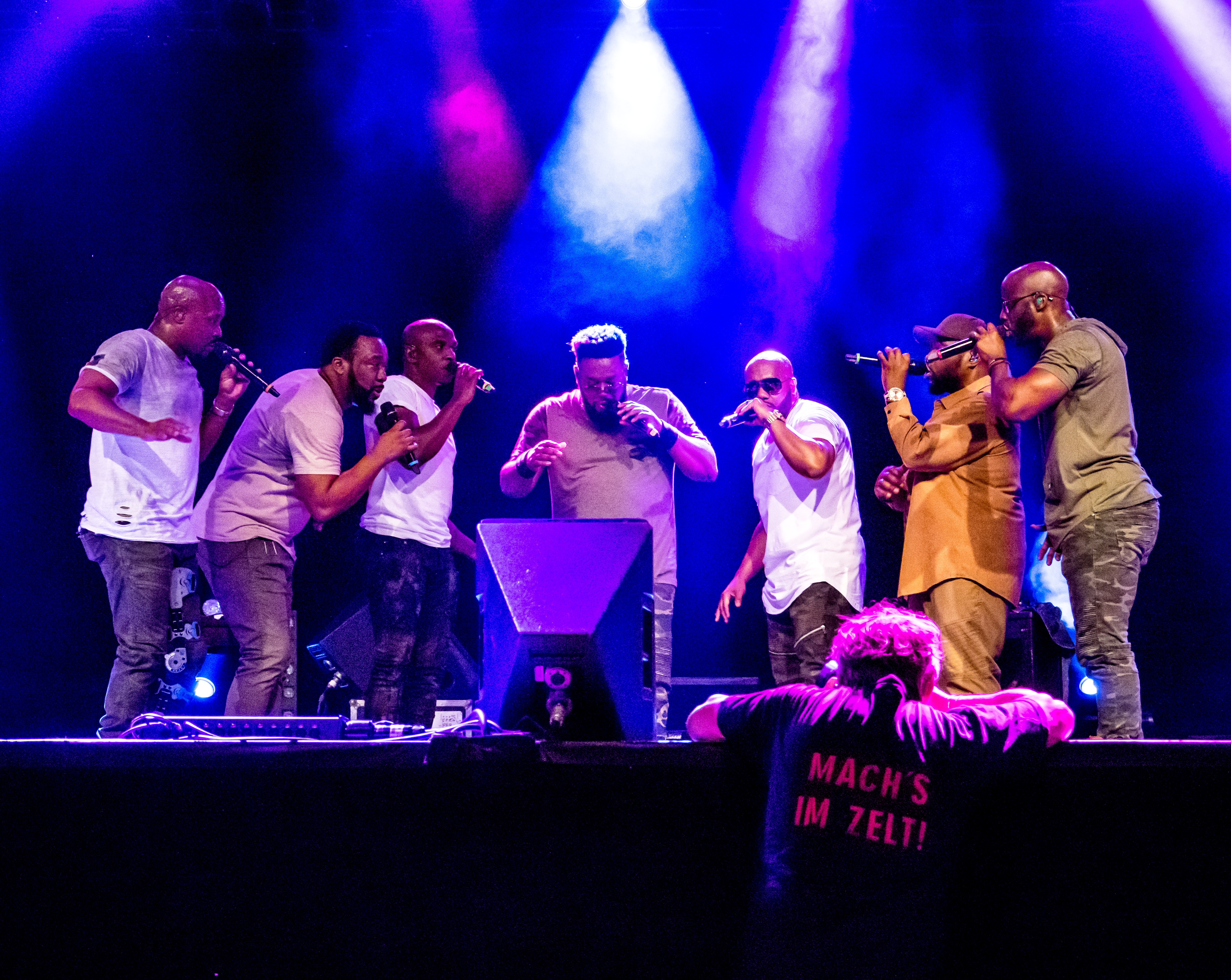 Bilder vom Zelt Musik Festival 2018 in Freiburg im Breisgau Auftritt Naturally 7 am 24. Juli 2018 im Zirkuszelt "A capella Nacht"